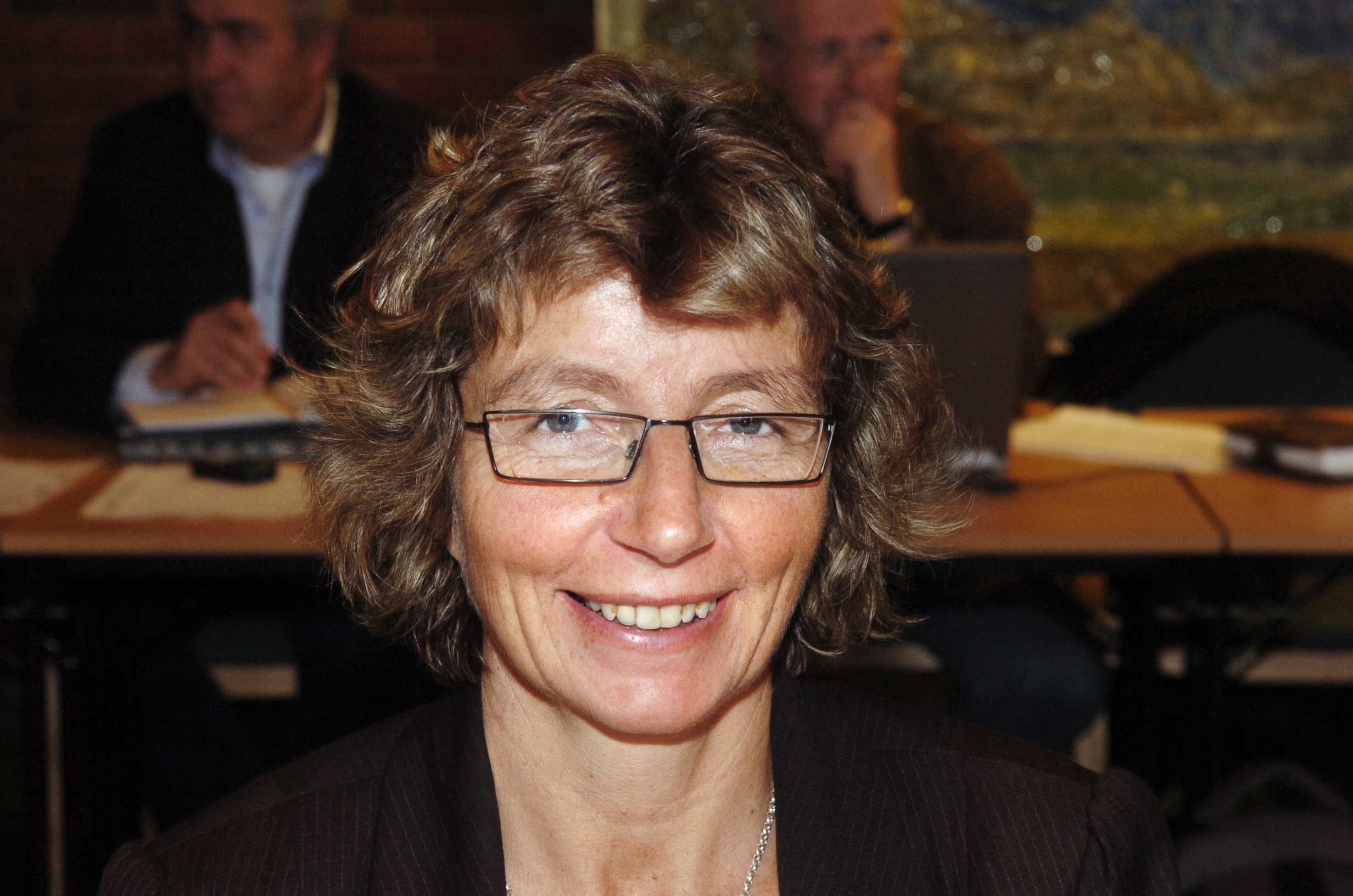 Vigdis Hjulstad Belbo (Sp), medlem av Nord-Trøndelag fylkesting og ordfører i Snåsa.